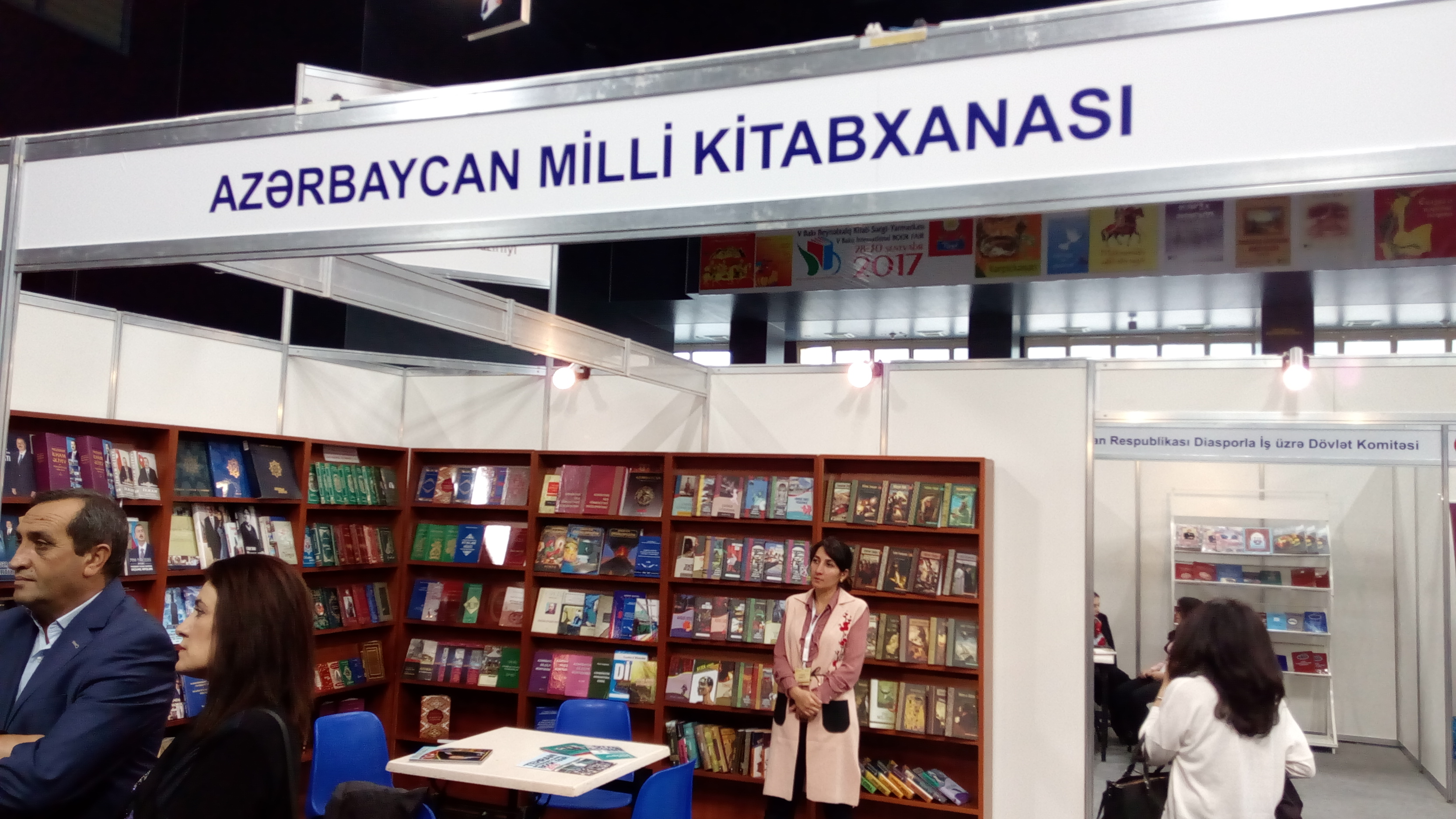 V Bakı Beynəlxalq Kitab Sərgi-Yarmarkası